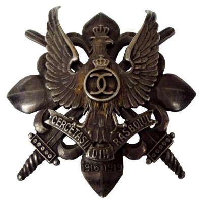 argint, interbelica, Carol al II-lea